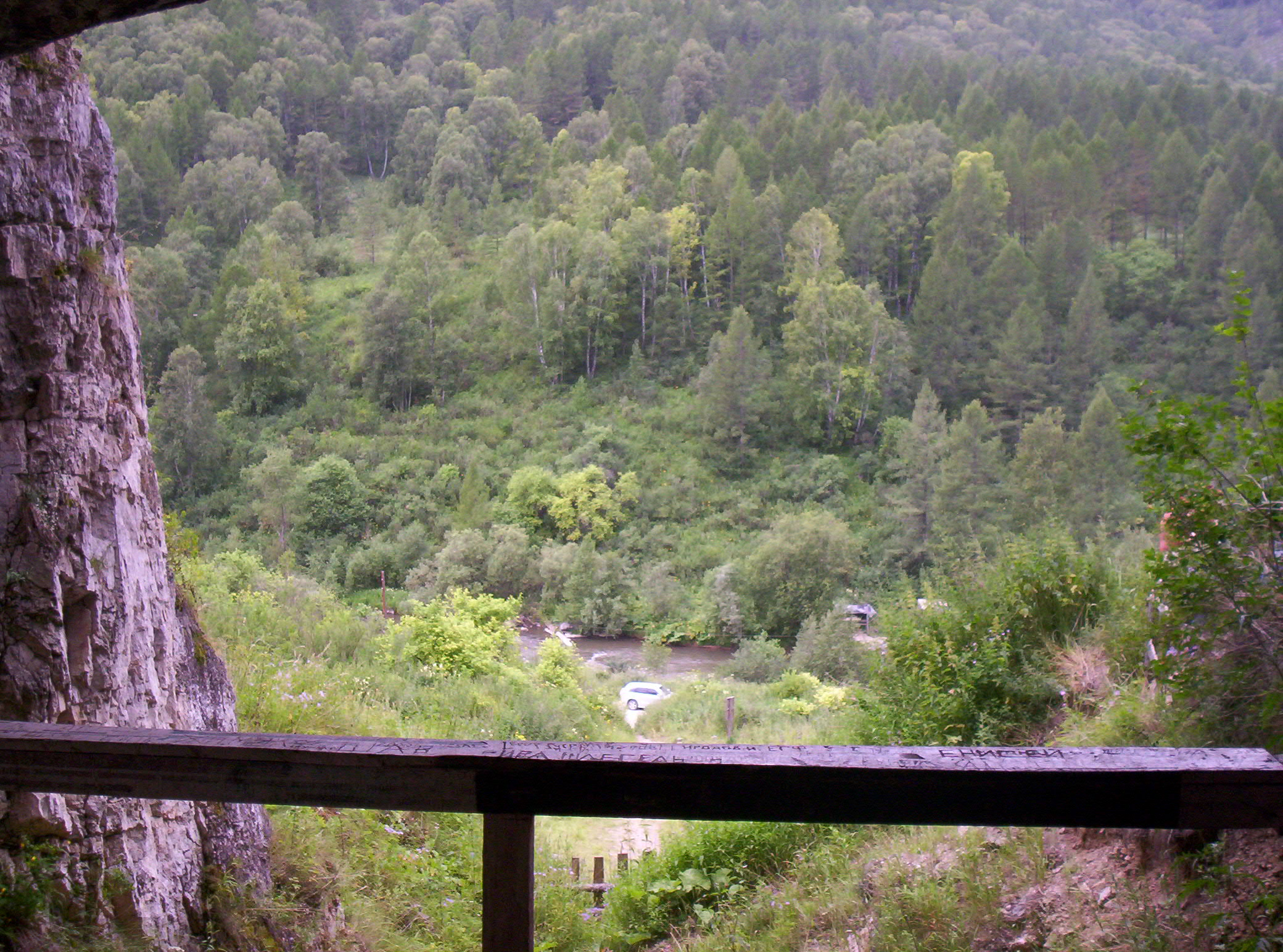 Вид из Денисовой пещеры на реку Ануй, Солонешенский район, Алтайский край